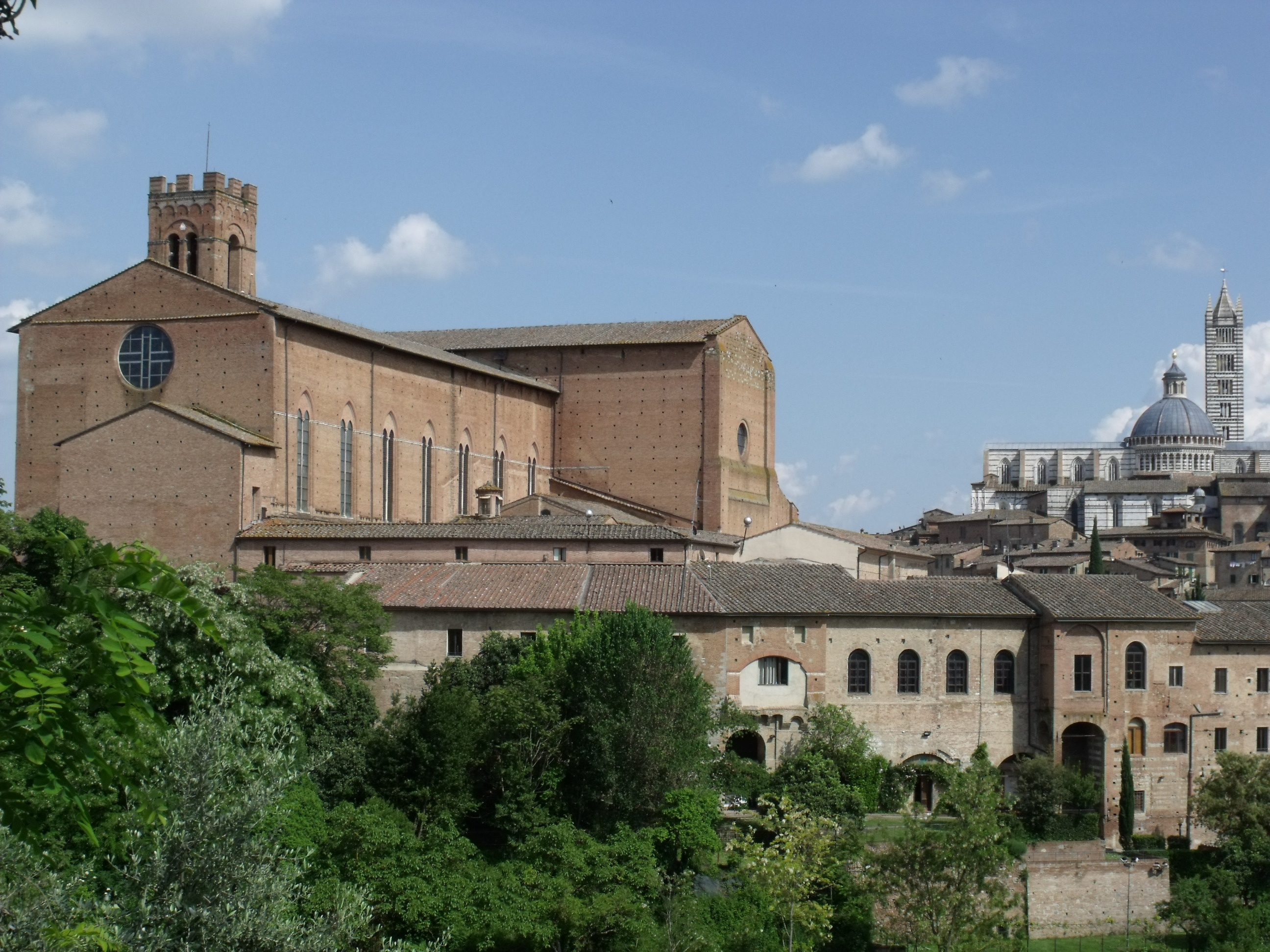 Basilica di San Domenico: Fassade und Kloster vom Ortsteil San Prospero gesehen